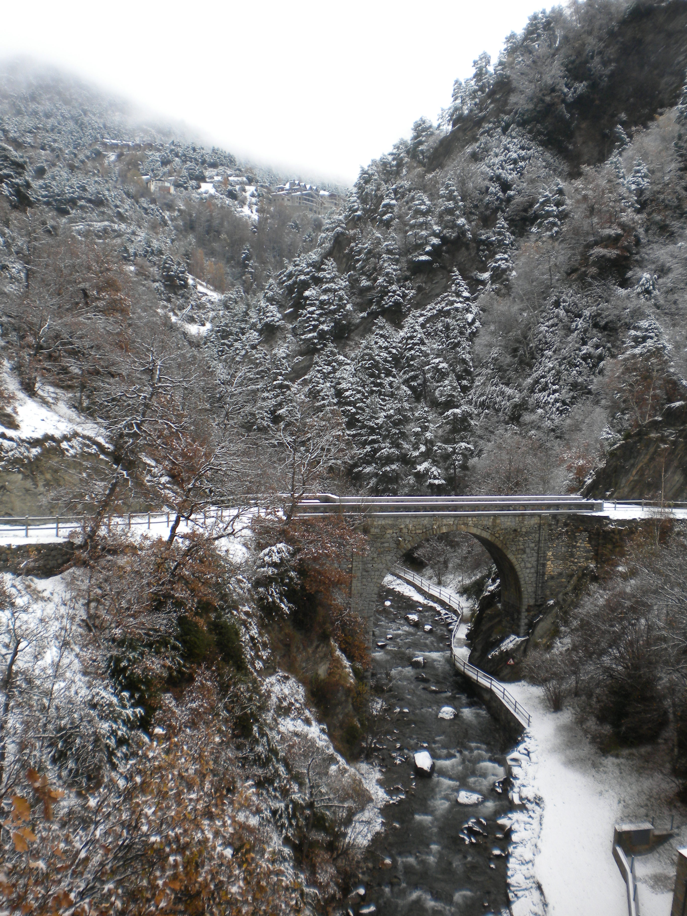 Antic pont de granit d'Anyós nevat, sobre el riu Valira del Nord, a la parròquia de la Massana, a Andorra.